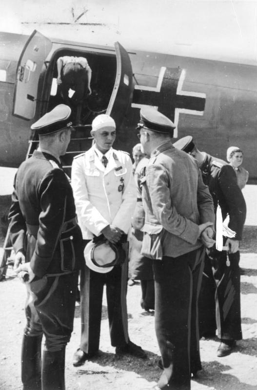 474 c/Athen - Berlin ....in wenigen Stunden! Das deutsche Heeressanitätswesen ist hinsichtlich der Mustergültigkeit seiner Einrichtungen und vor allem der Massnahmen zum schnellsten Heimtransport Verwundeter wohl einzigartig in der Welt. Wenn irgend angängig, erfolgen die Beförderungen der Verletzten und Kranken mittels schnellen und geräumigen Flugzeugen. UBz: Auch der verwundete Ritterkreuzträger Major Koch, der Erstürmer von Eben Emael, kehrt auf diesem Wege in die Heimat zurück. PK.-Rauchwetter-Atlantic, 21.6.1941